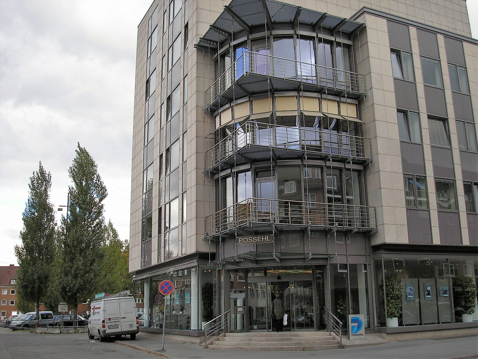 Gebäude der Possehlstiftung Lübeck